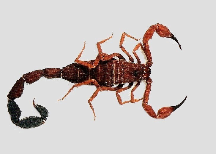 Tityus discrepans (Scorpiones: Buthidae) de Venezuela.